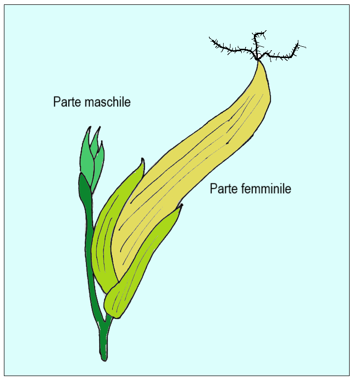 Pharoideae (Poaceae) - Spighetta